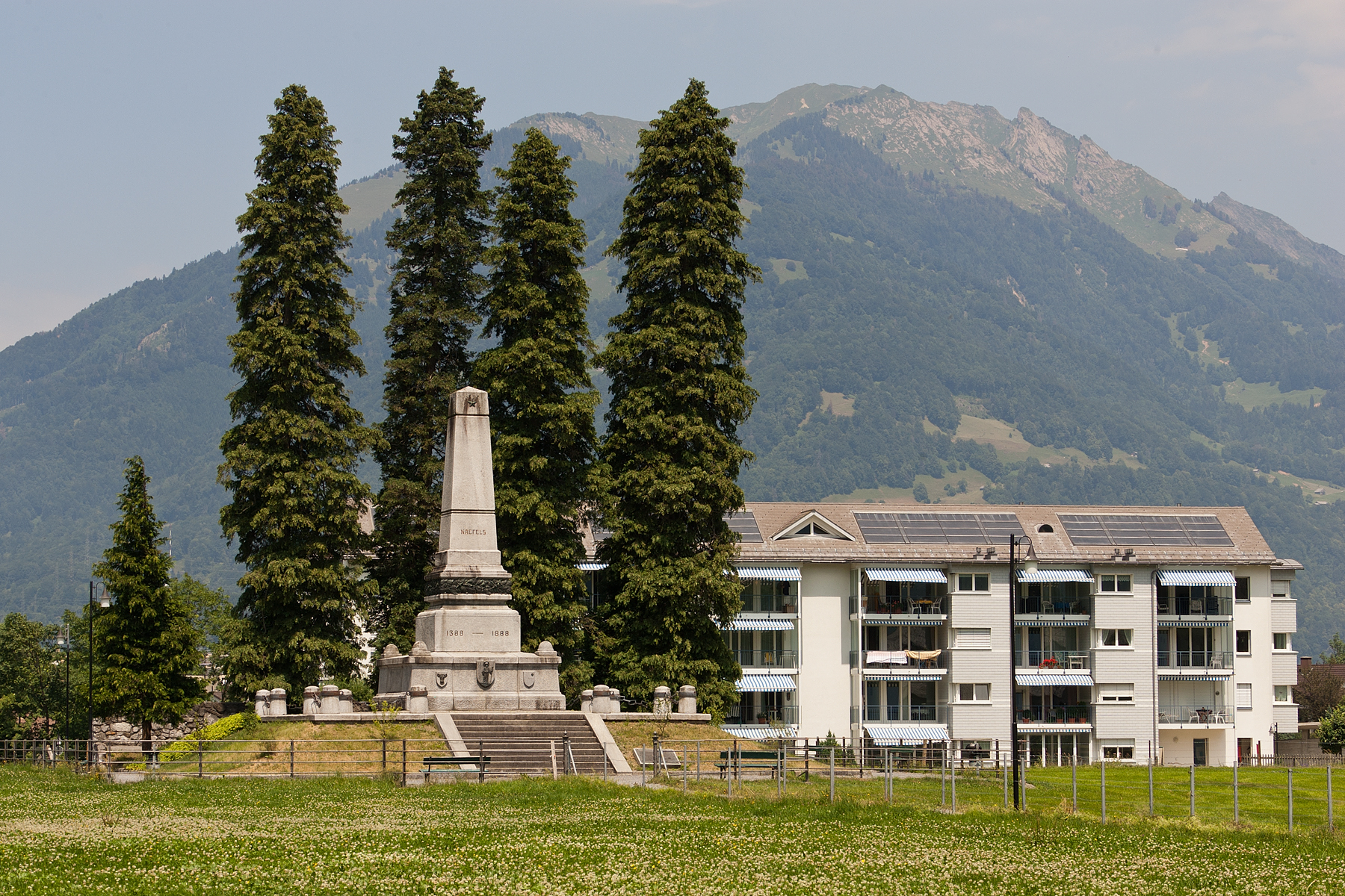 Schlachtdenkmal in Näfels (GL)